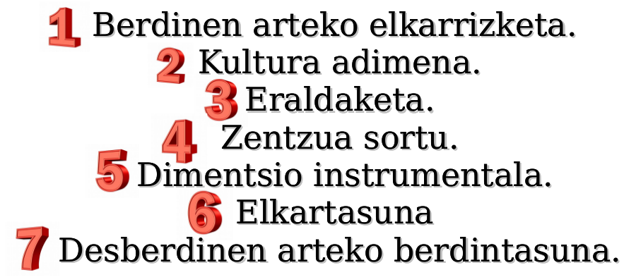 Ikaskuntza dialogikoa 7 hatsarreak